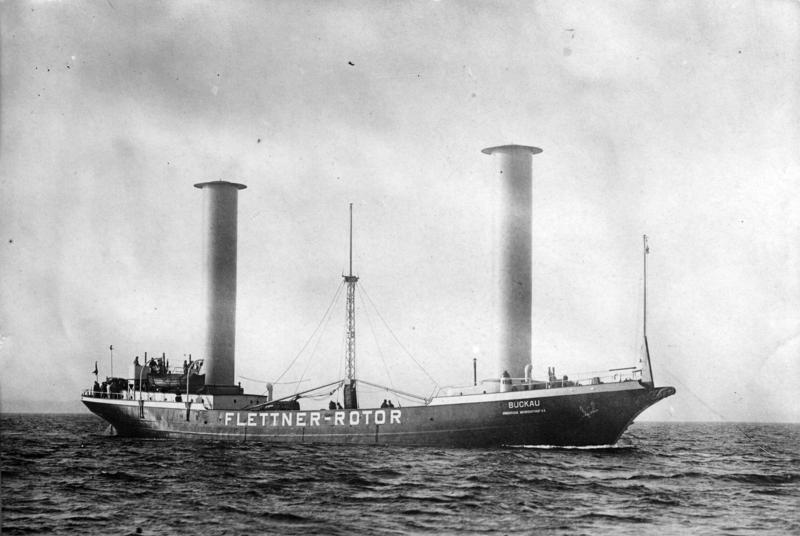 Kiel. Das neue Windkraftschiff. Das von dem bekannten Ingenieur Anton Flettner erfundene Windkraftschiff, welches eine ungeheure Brennstoff-Ersparnis ermöglicht, bei einer Probefahrt in der Ostsee.